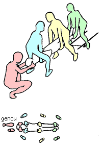 image:vertical_lifting_feet.png Relevage par un pont amélioré, le brancard venant par les pieds. L'illustration du bas montre une vue de dessous. Auteur : Christophe Dang Ngoc Chan (Cdang), dessin original numérisé.